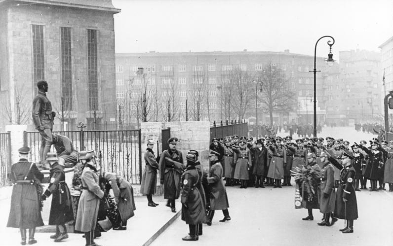 Berlin, Rosa-Luxemburg-Platz, Kranzniederlegung Zentralbild "Tag der deutschen Polizei" am 16.1.1937 in Berlin. Kranzniederlegungen am Polizeidenkmal, dem Horst-Wessel-Platz, durch den Reichsführer-SS und Chef der deutschen Polizei Heinrich Himmler, den Chef der Ordnungspolizei General d. P. Kurt Daluege, den Chef der Sicherheitspolizei und des S.D. SS-Gruppenführer Reinhard Heydrich und der Korpsführer des NSKK Adolf Hühnlein. UBz: ganz links Heydrich, vor dem Denkmal Hühnlein, rechts auf der Stufe Daluege, ganz rechts Himmler. Abgebildete Personen: Himmler, Heinrich: Reichsführer der SS, Deutschland (GND 11855123X) Heydrich, Reinhard: SS-Obergruppenführer, Leiter des SD, Chef des Reichssicherheitshauptamtes (RSHA), Deutschland (GND 118550640) Daluege, Kurt Max Franz: Polizeigeneral, SS-Oberst-Gruppenführer, Chef der Ordnungspolizei, 1946 in Prag hingerichtet, Deutschland Hühnlein, Adolf: Reichstagsabgeordneter (MdR), NSDAP, Korpsleiter des Nationalsozialistischen Kraftfahrerkorps (NSKK), Deutschland (GND 117046736)